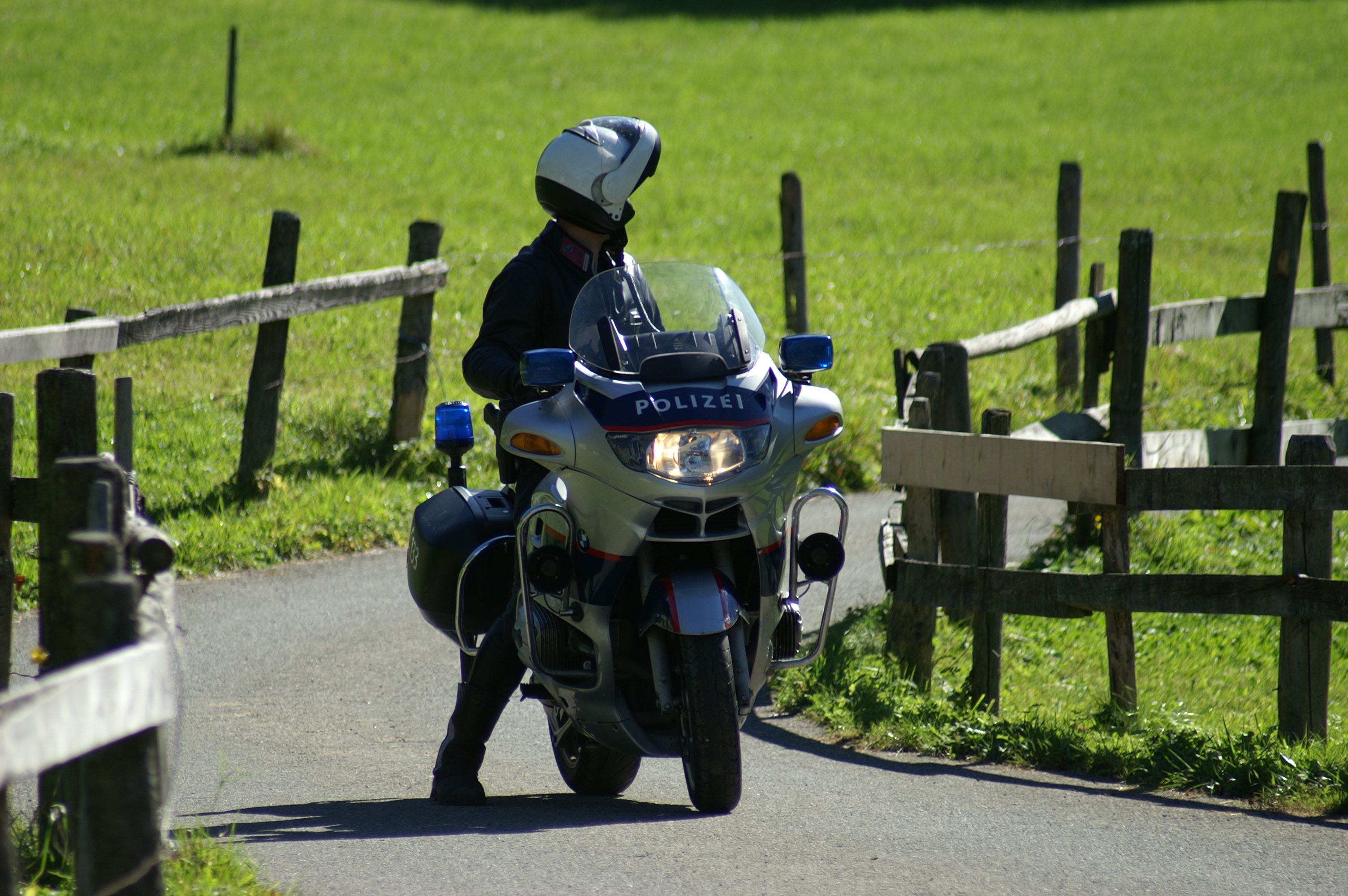 Almabtrieb der Schafe vom Schröcken nach Schoppernau im Bregenzerwald Dieses Highlight wird mit dem “Veahmätle” (kleiner Viehmarkt) gefeiert.